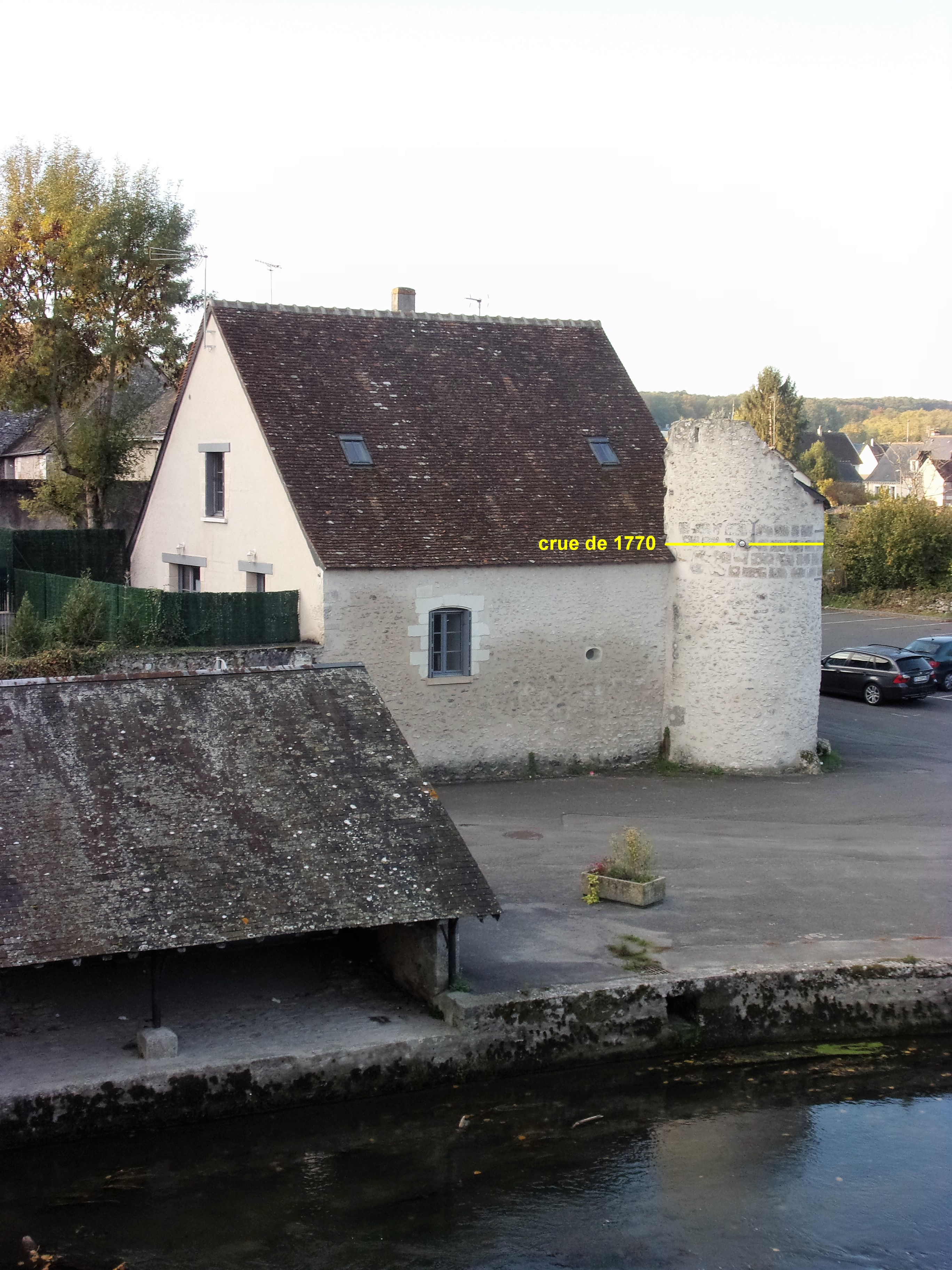 Repère de crue sur le mur d'une tour.